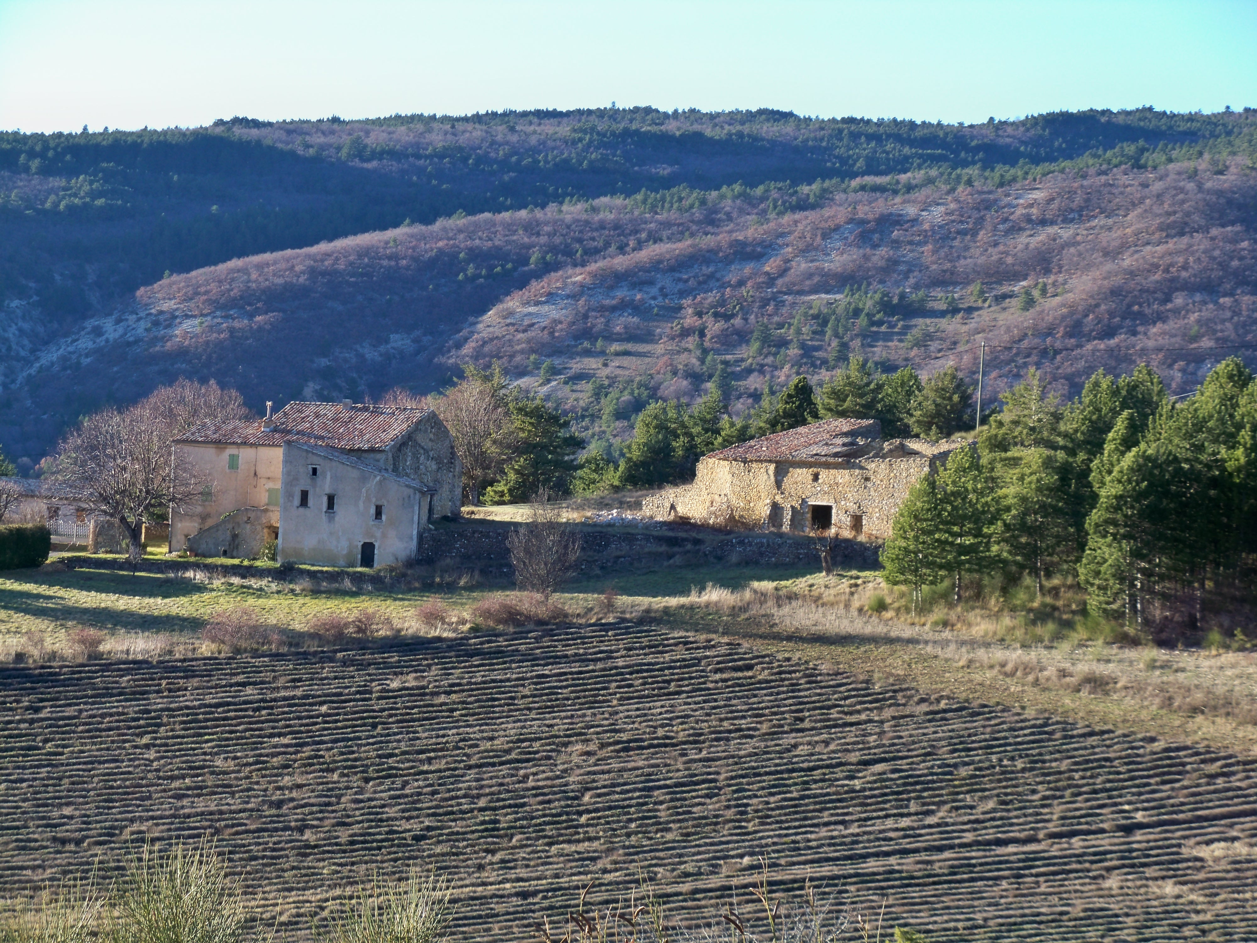 Maison à terre à Aurel, Vaucluse, France.